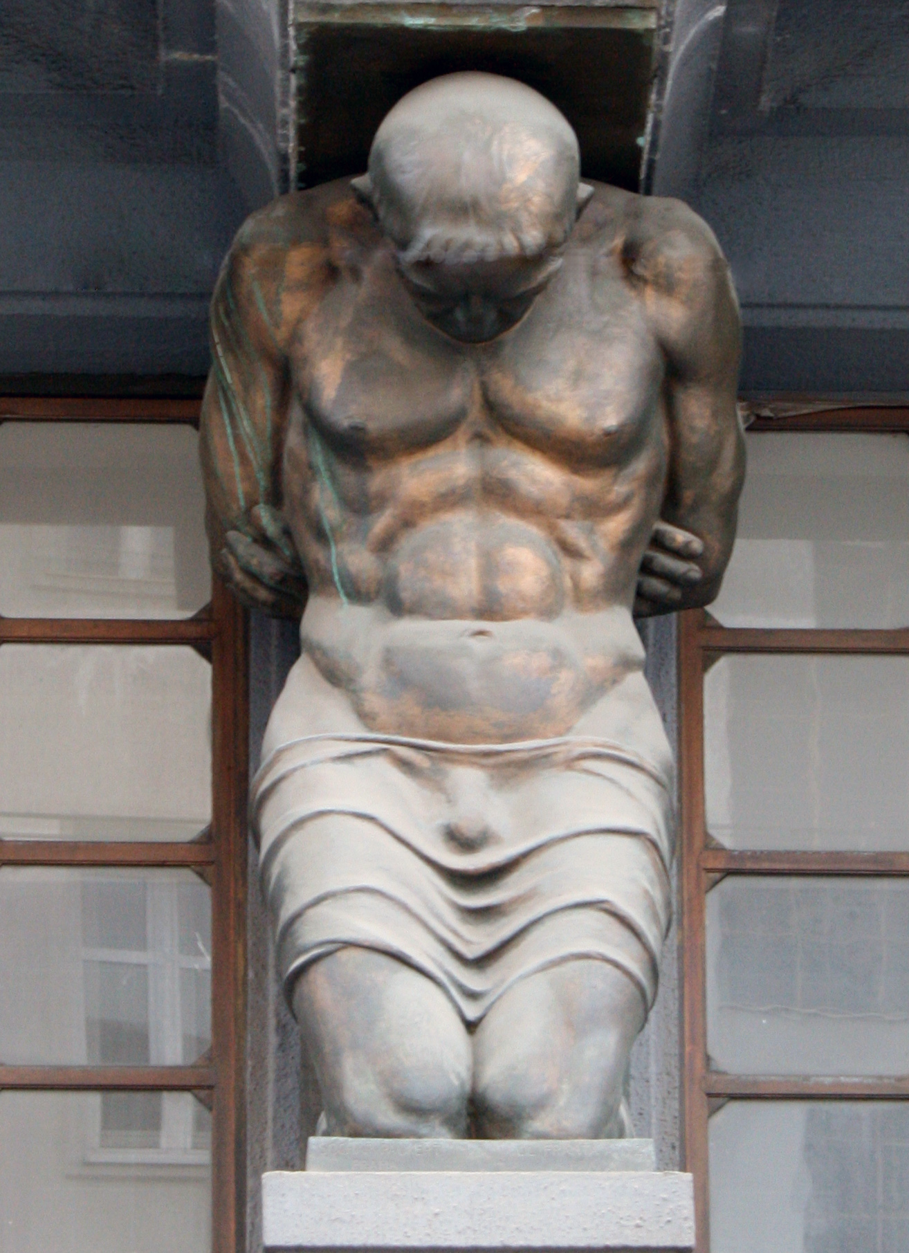 Čelný pohľad na bronzovu plastiku Atlanta na policajnom riaditeľstve v Bratislave. Atlant je sochársky architektonický prvok v podobe svalnatých mužských postav, používaný vo funkcií stĺpu či pilastra